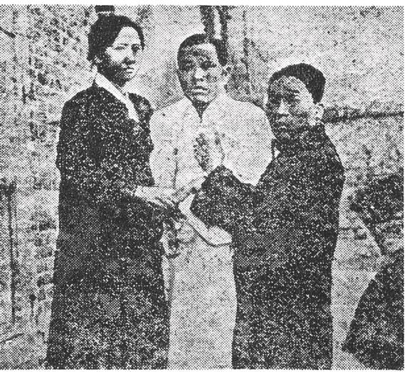 1927년 11월, 수감 중 병보석으로 풀려난 공산주의 운동가 박헌영.